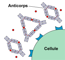 Schéma de Neutralisation de toxines par des anticorps. Auteur : Yohan Source : Crée avec un logiciel de dessin vectoriel